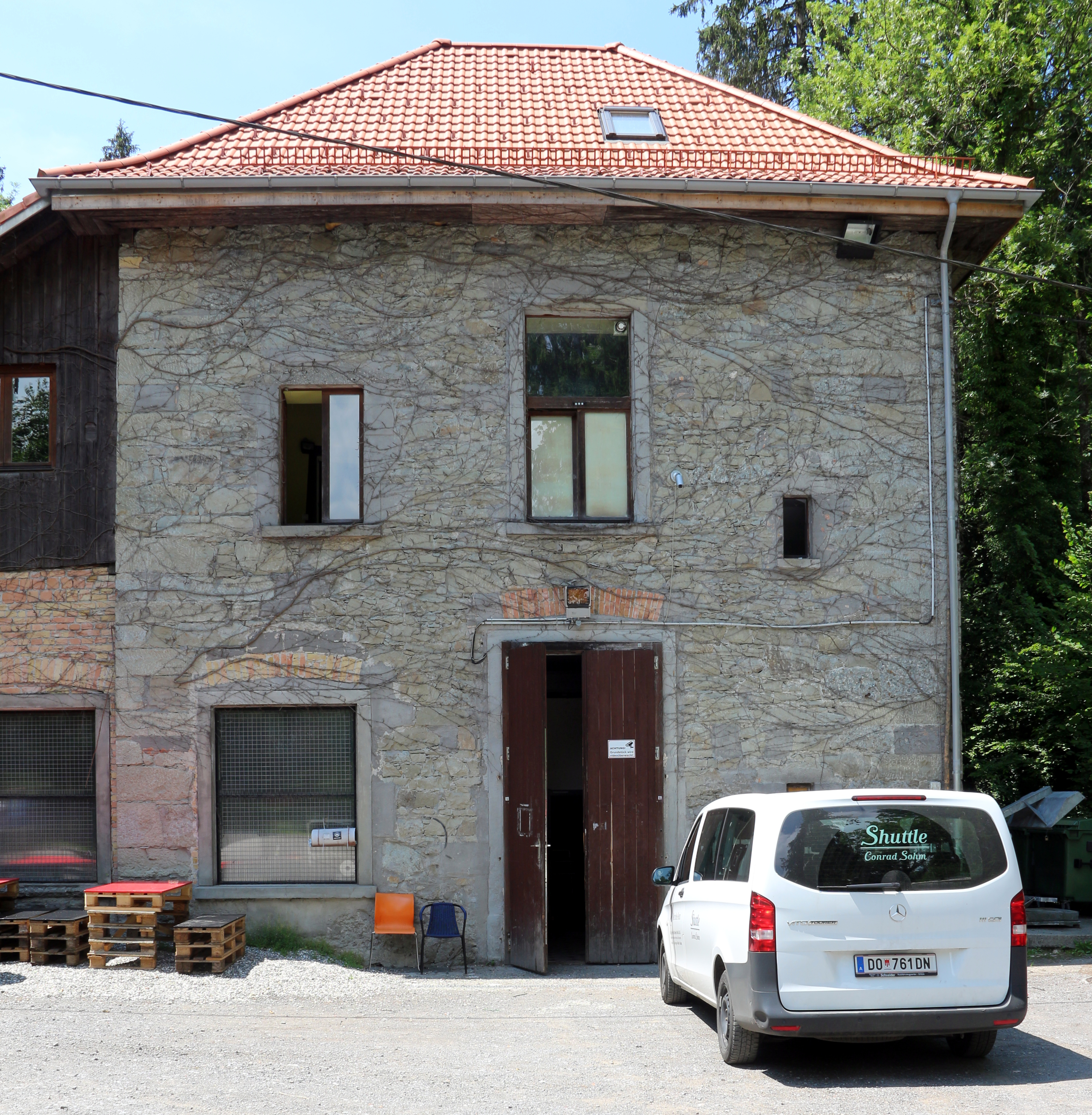 Rückseite der ehemaligen Textilfabrik, heute Veranstaltungsort "Conrad Sohm" in Dornbirn, Vorarlberg.